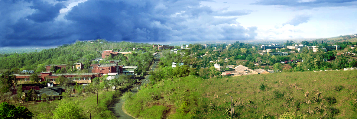 सागर में पथरिया हिल्‍स स्थित डॉ हरिंसिंह गौर विश्वविद्यालय का विहंगम दृश्‍य